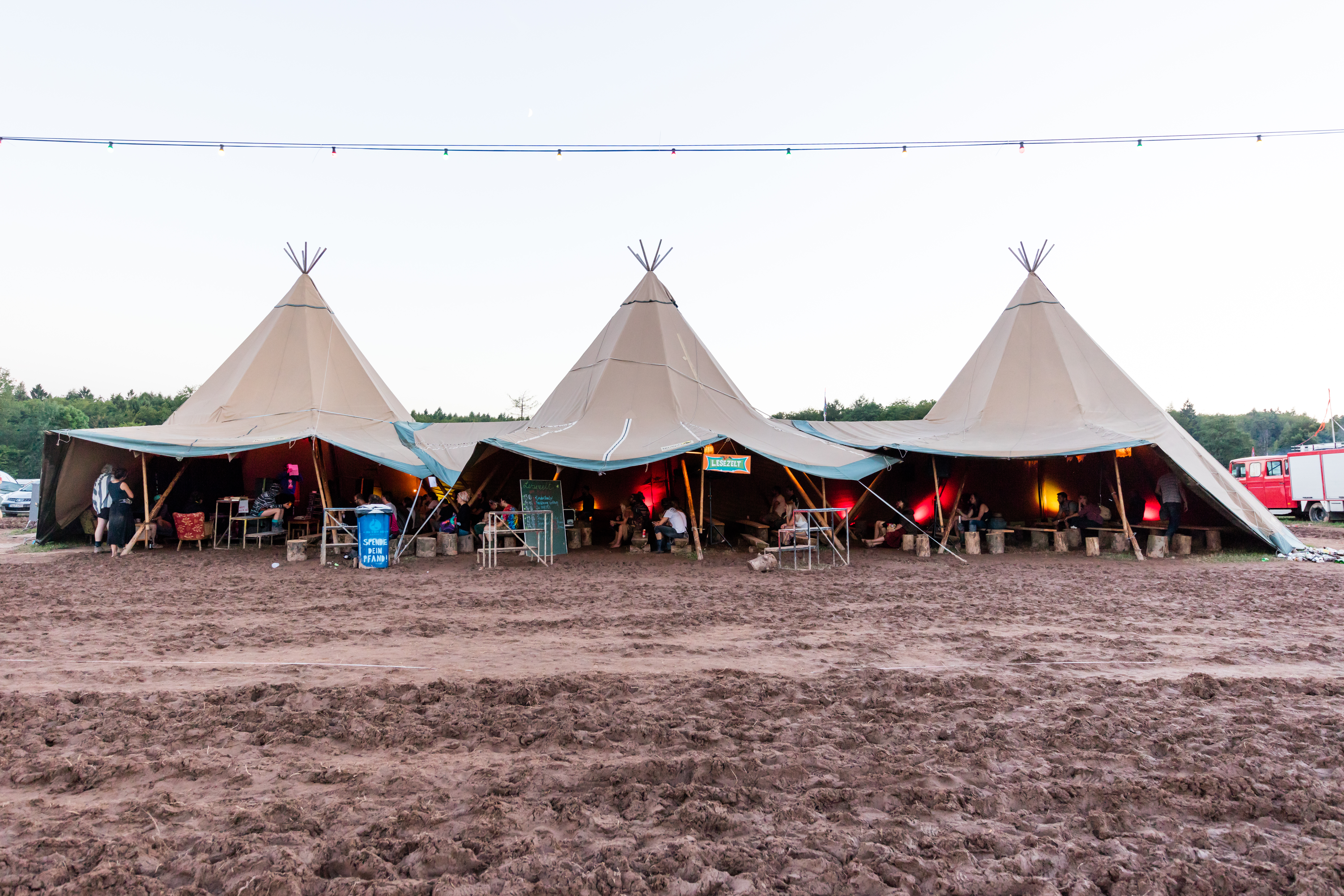 Festivalgelände during Burg Herzberg Festival at Hessen, Breitenbach am Herzberg, , Germany on 2017-07-29, Photo: Sven Mandel